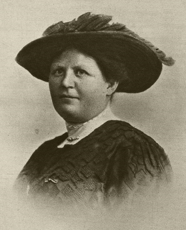 F Steenberghe Engeringh. Uit Katholieke Illustratie van 12 juli 1922.